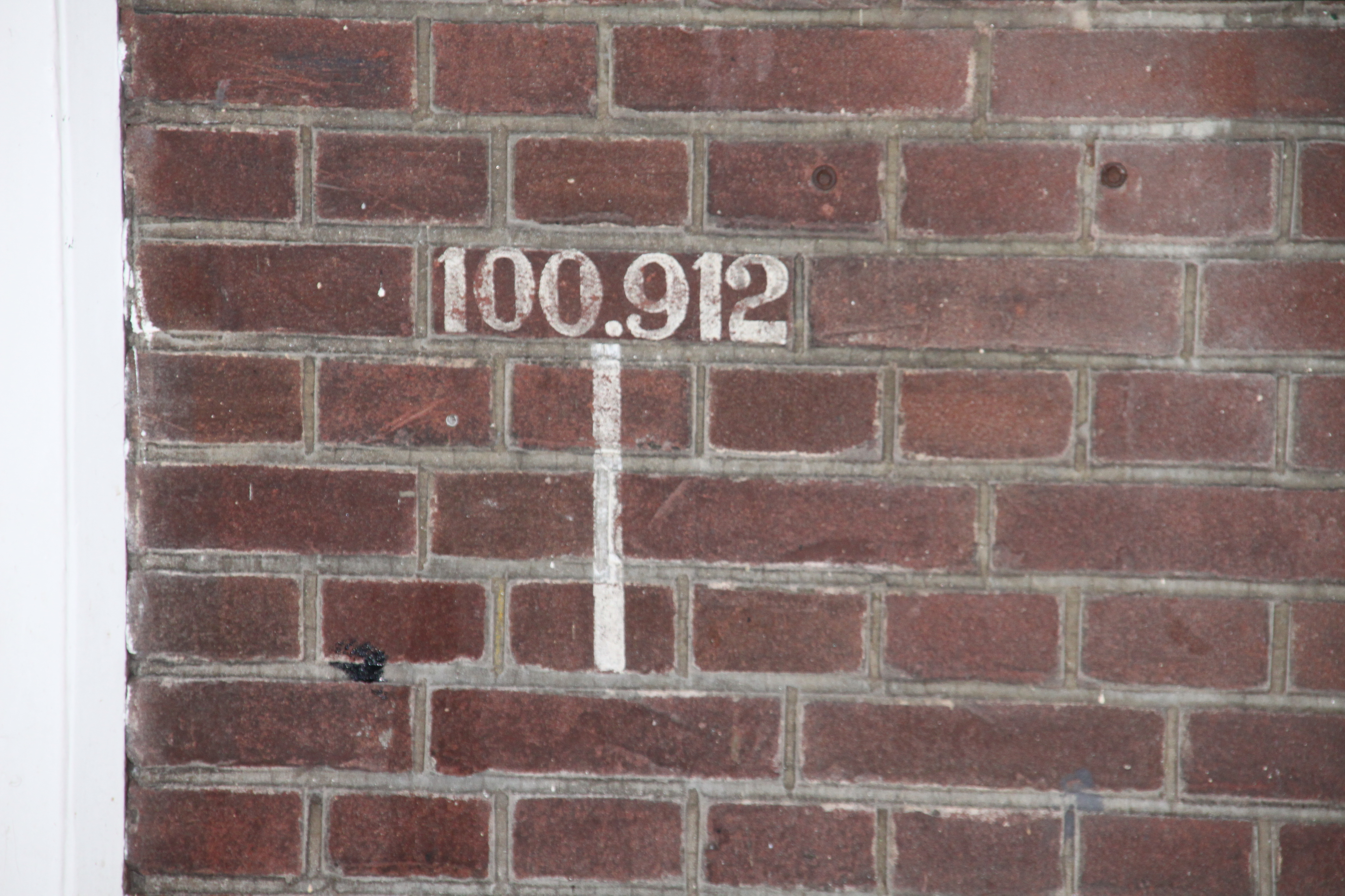 Opschrift op gebouw station Kampen: kilometrering Oosterspoorweg.